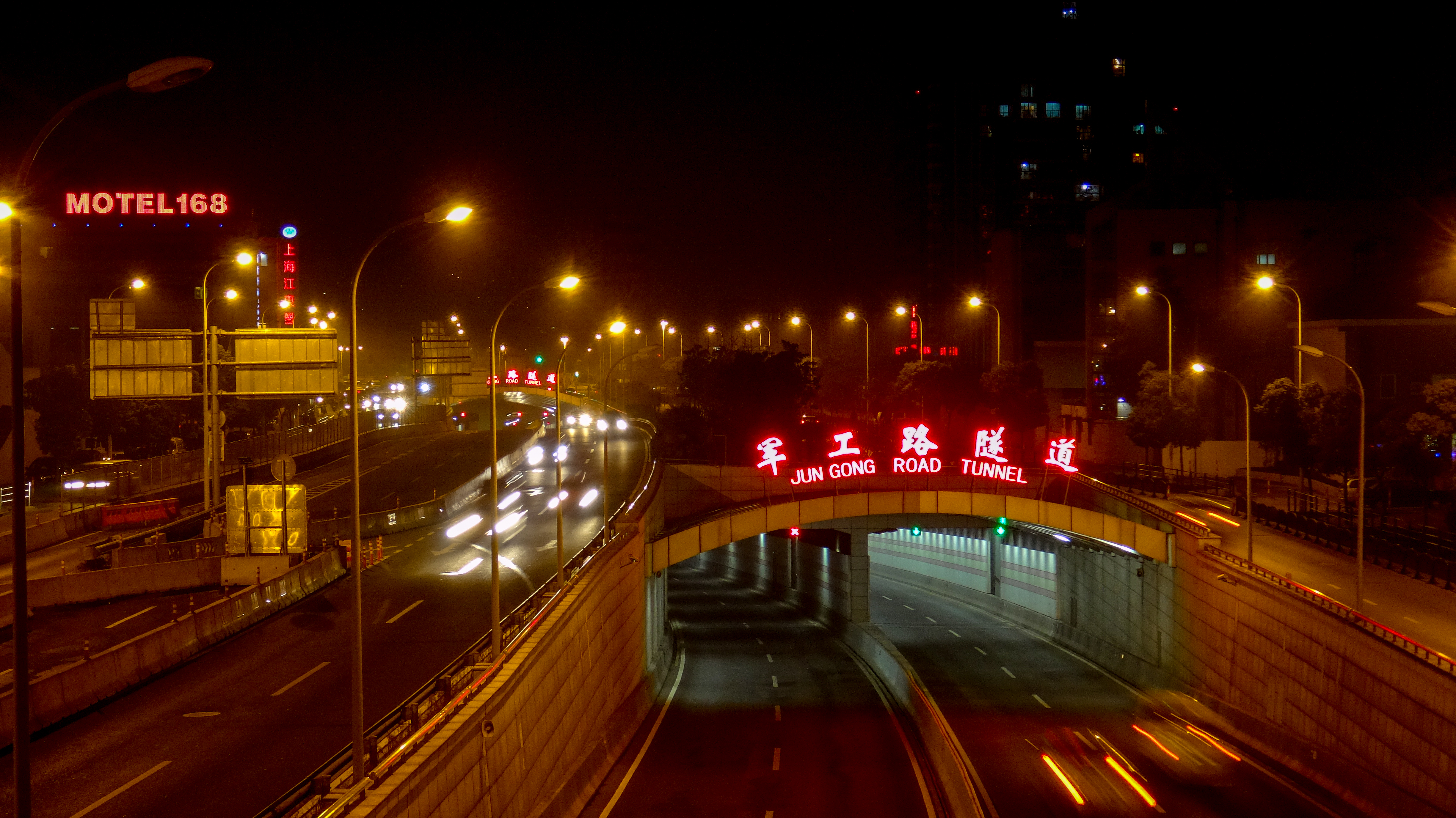 Jungong Rd Tunnel